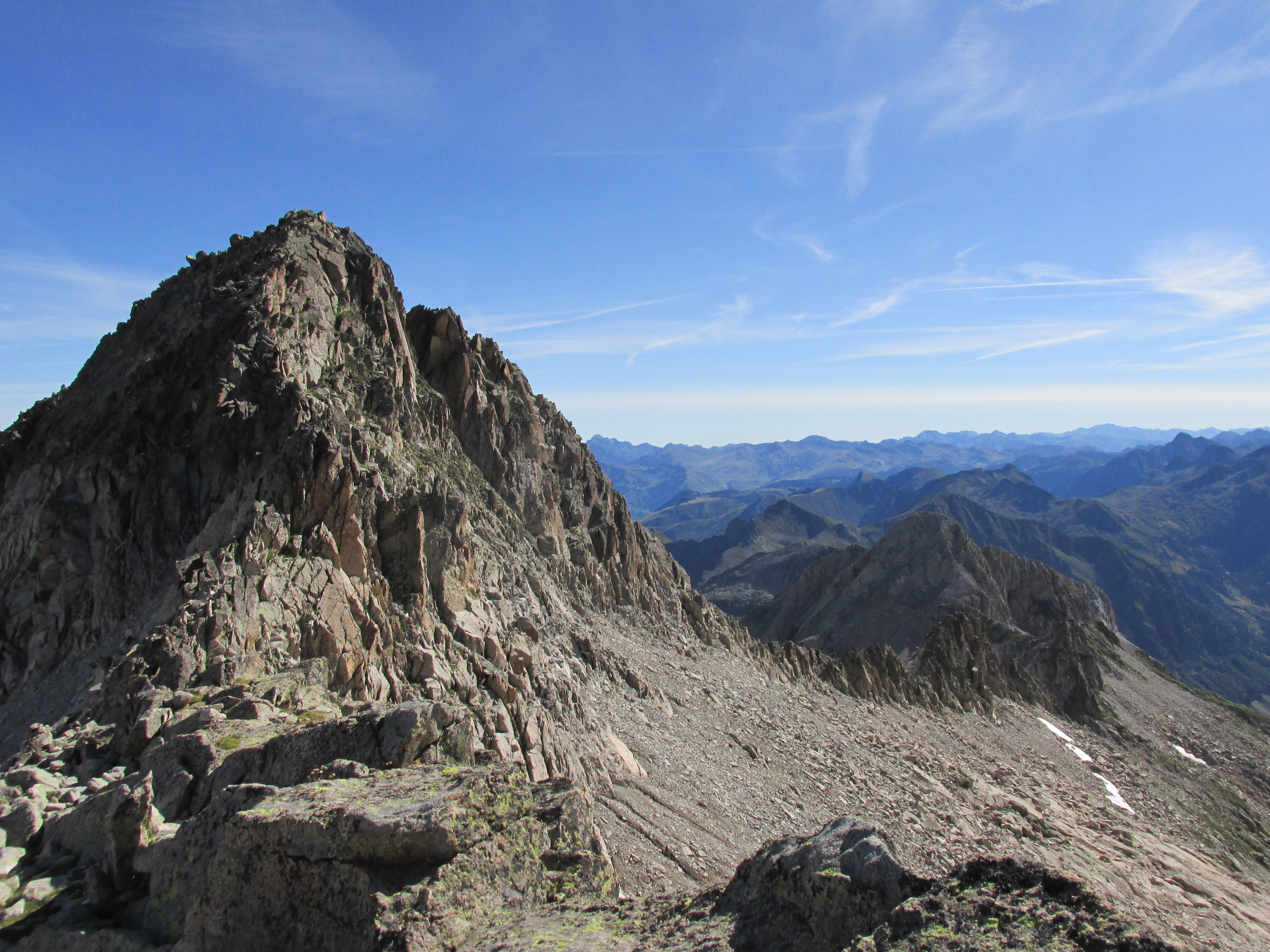 Muntanya de 2975m